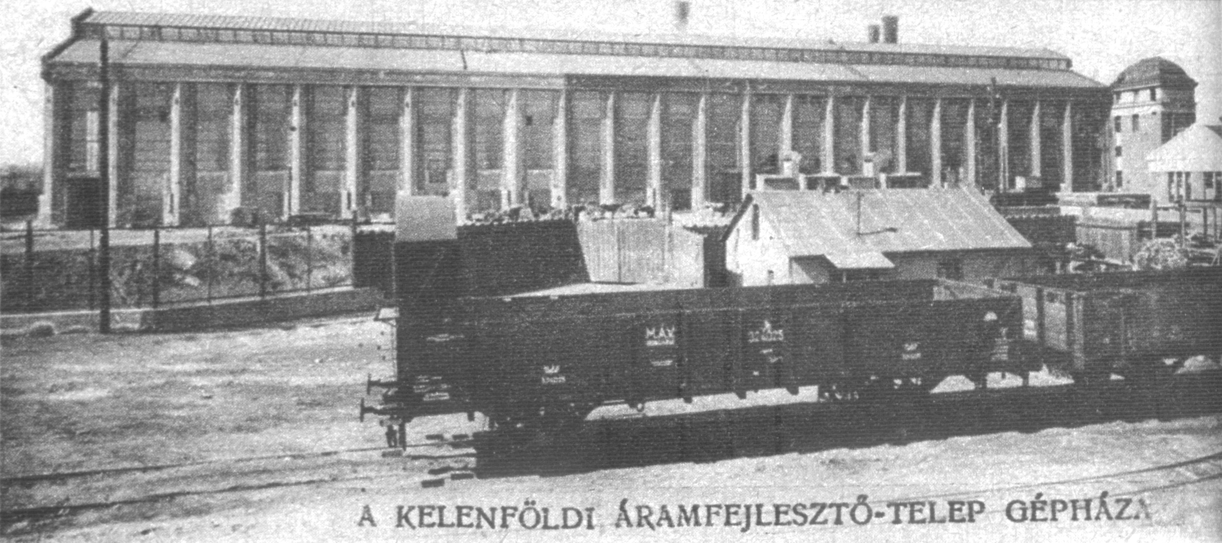 Az Elektromos Művek kelenföldi áramfejlesztő telepének gépháza